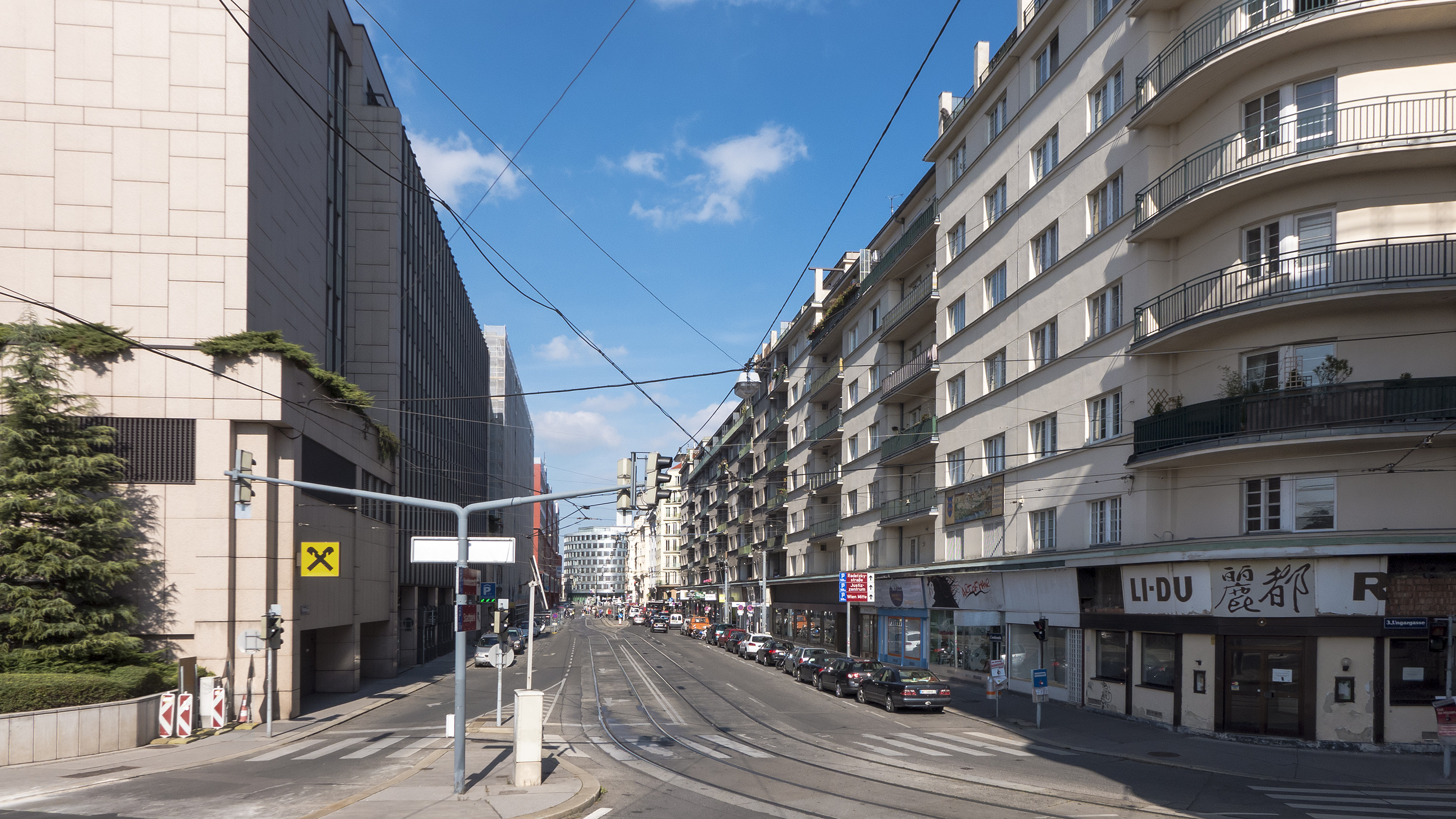 Invalidenstraße in Wien 3 bei der Ungargasse Richtung Norden